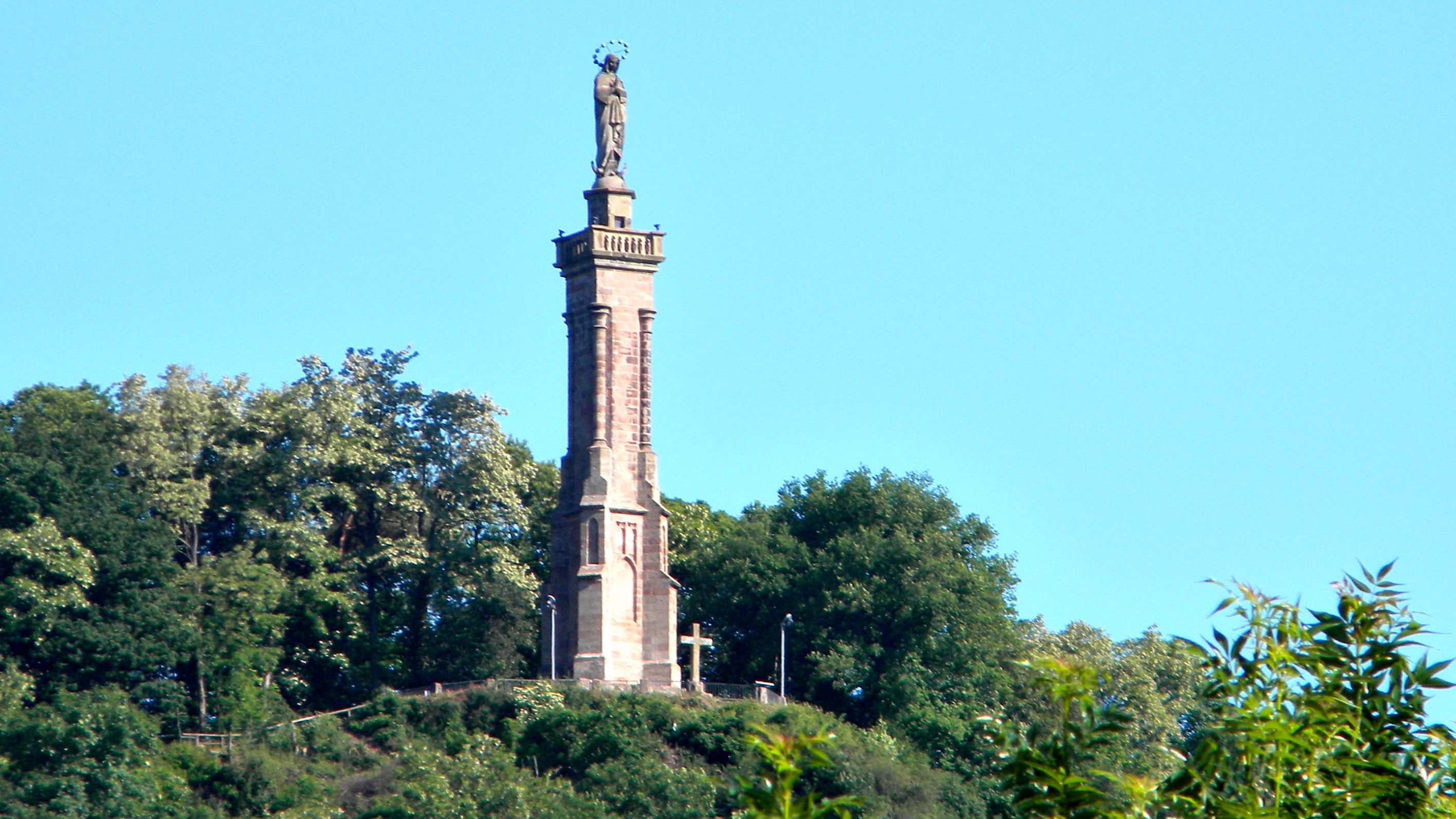 Mariensäule über den Abhängen von Trier